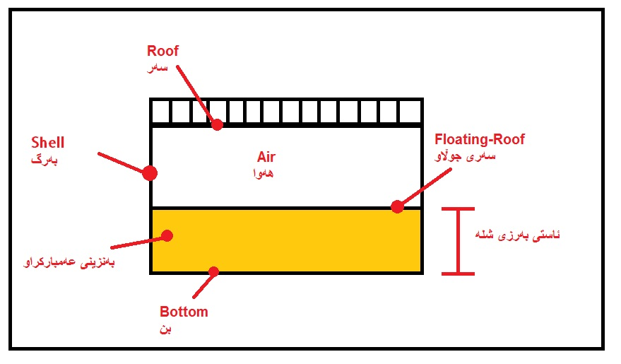 کوردی: kurd